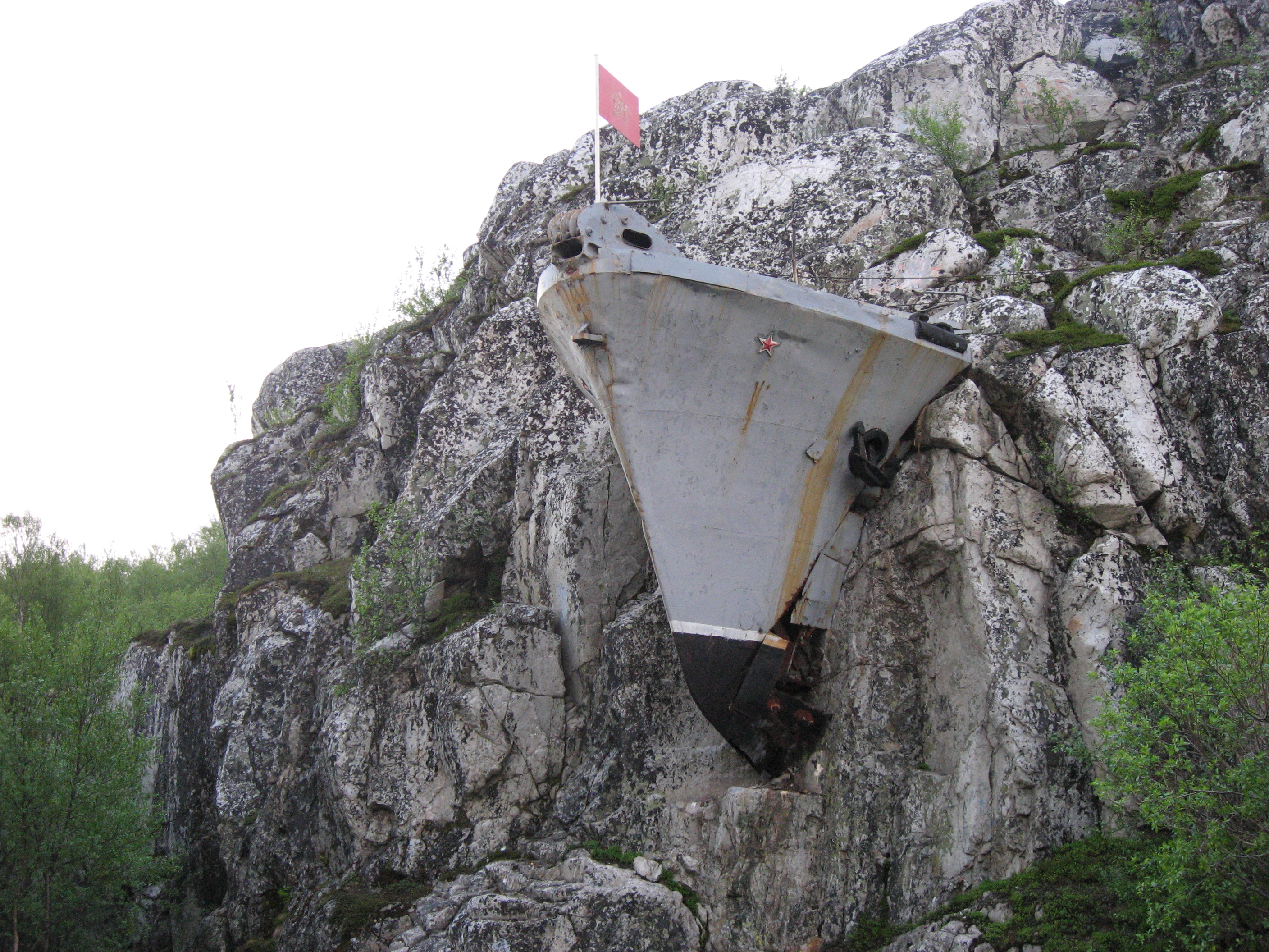 Носовая часть тральщика, памятный знак морякам ОВРа (в/ч 10678). Его открытие было приурочено к 30-летию взятия порта Лиинахамари (1974 год).